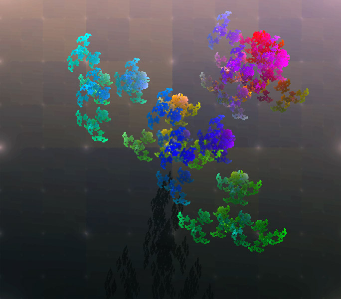 Birds!, är en 3D fraktal skapad med ett itererande funktionssystem. För en beskrivning av tekniken som skapat bilden se: sv::Bild:Sierpinskipyramid.jpg samt sv::Bild:Sierpinskioktaeder.jpg. Kategori:Bilder av fraktaler